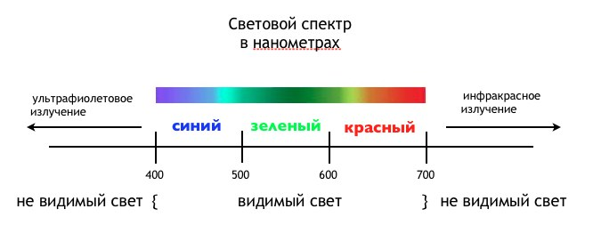 Видимый спектр излучения